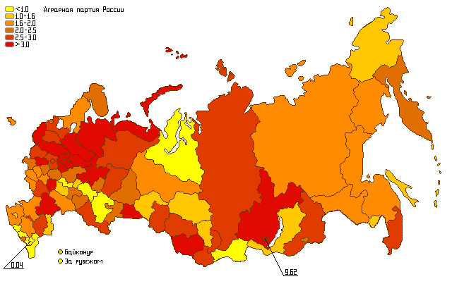 Результаты политической партии АПР на парламентских выборах 2007 года (по регионам)